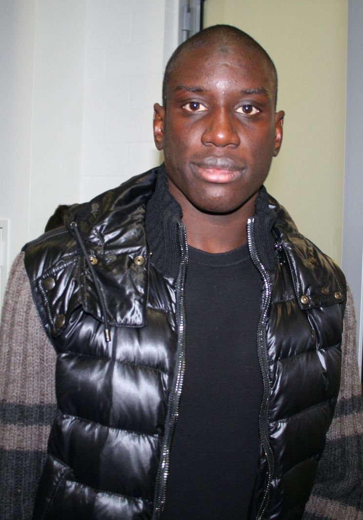 Fußballer Demba Ba nach dem Spiel TSG 1899 Hoffenheim gegen Energie Cottbus in der Sinsheimer Rhein-Neckar-Arena